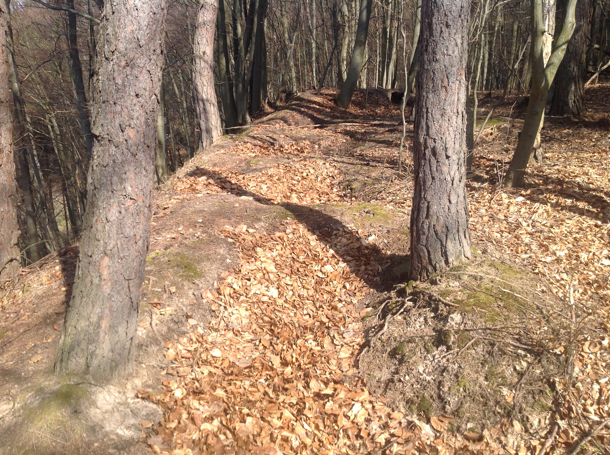 Na kopci Vicherec sa ešte dnes nachádza asi 12 malých už zasypaných dier kde kedysi boli partizánske bunkre z čias SNP